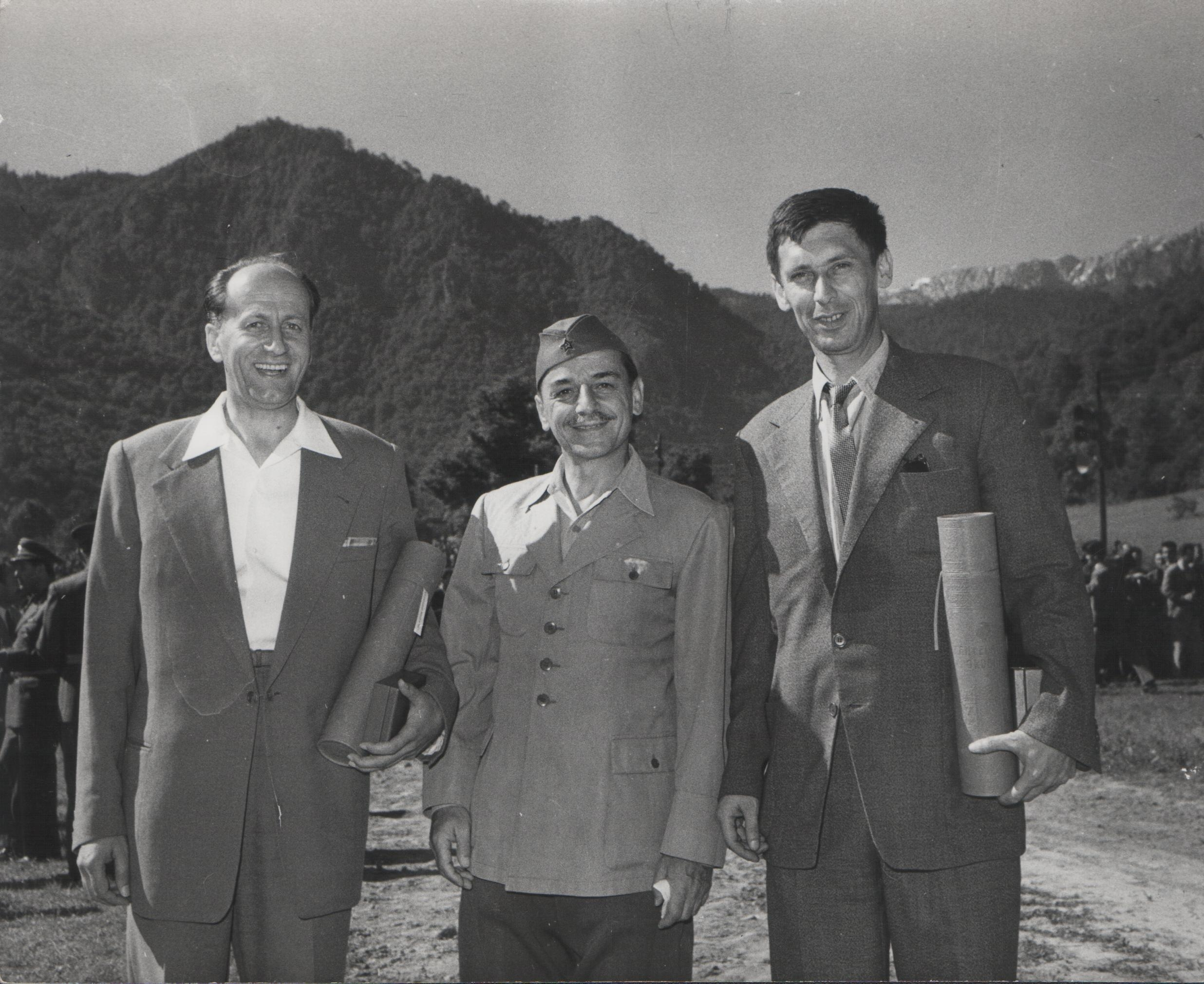 Koča Popović, Mijalko Todorović, Slobodan penezić Krcun na Sutjesci 1958.Foto Stevan Kragujević (po odobrenju kćerke Tanje Kragujević)